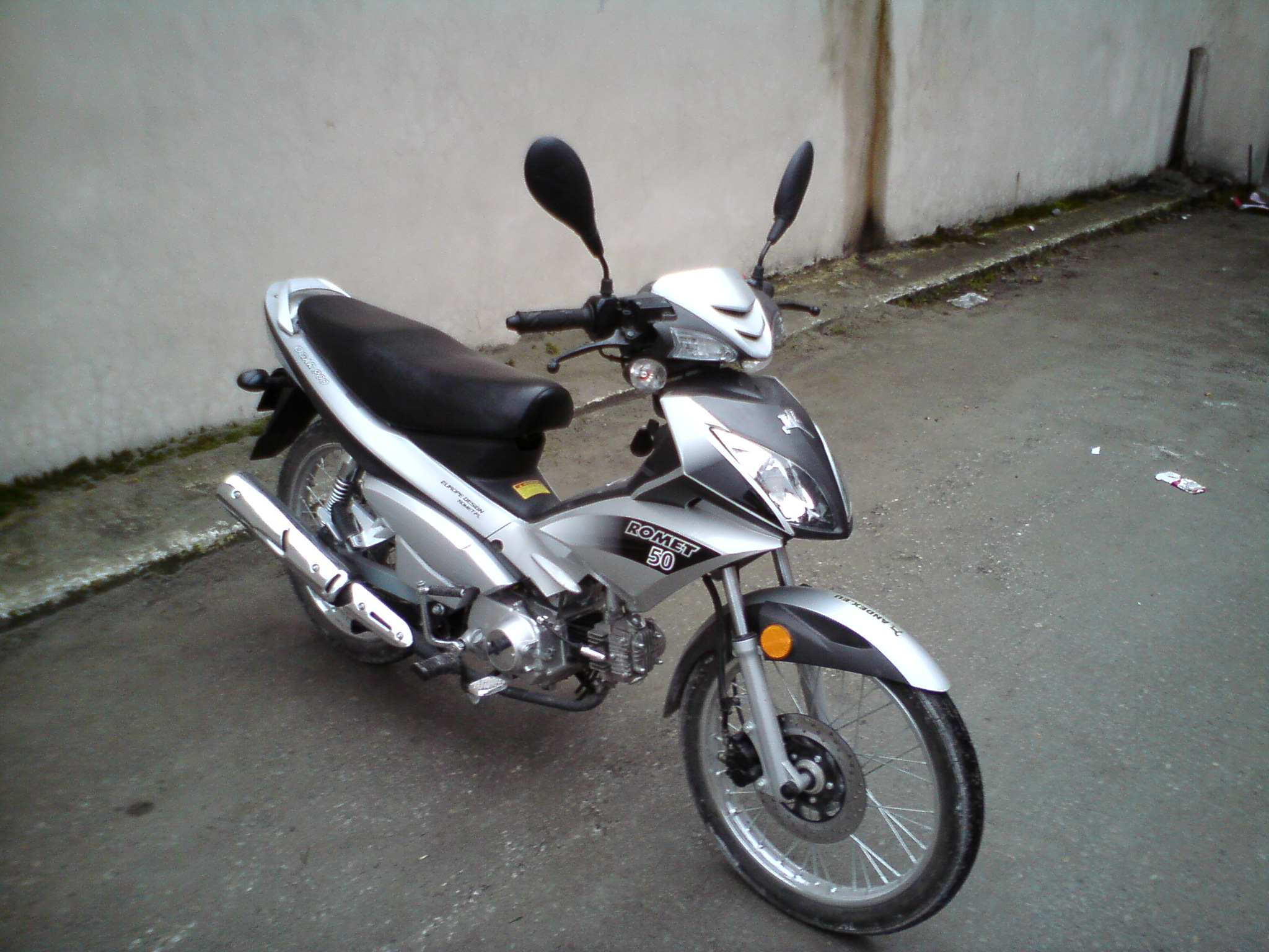 Motorower Romet Ogar 900.